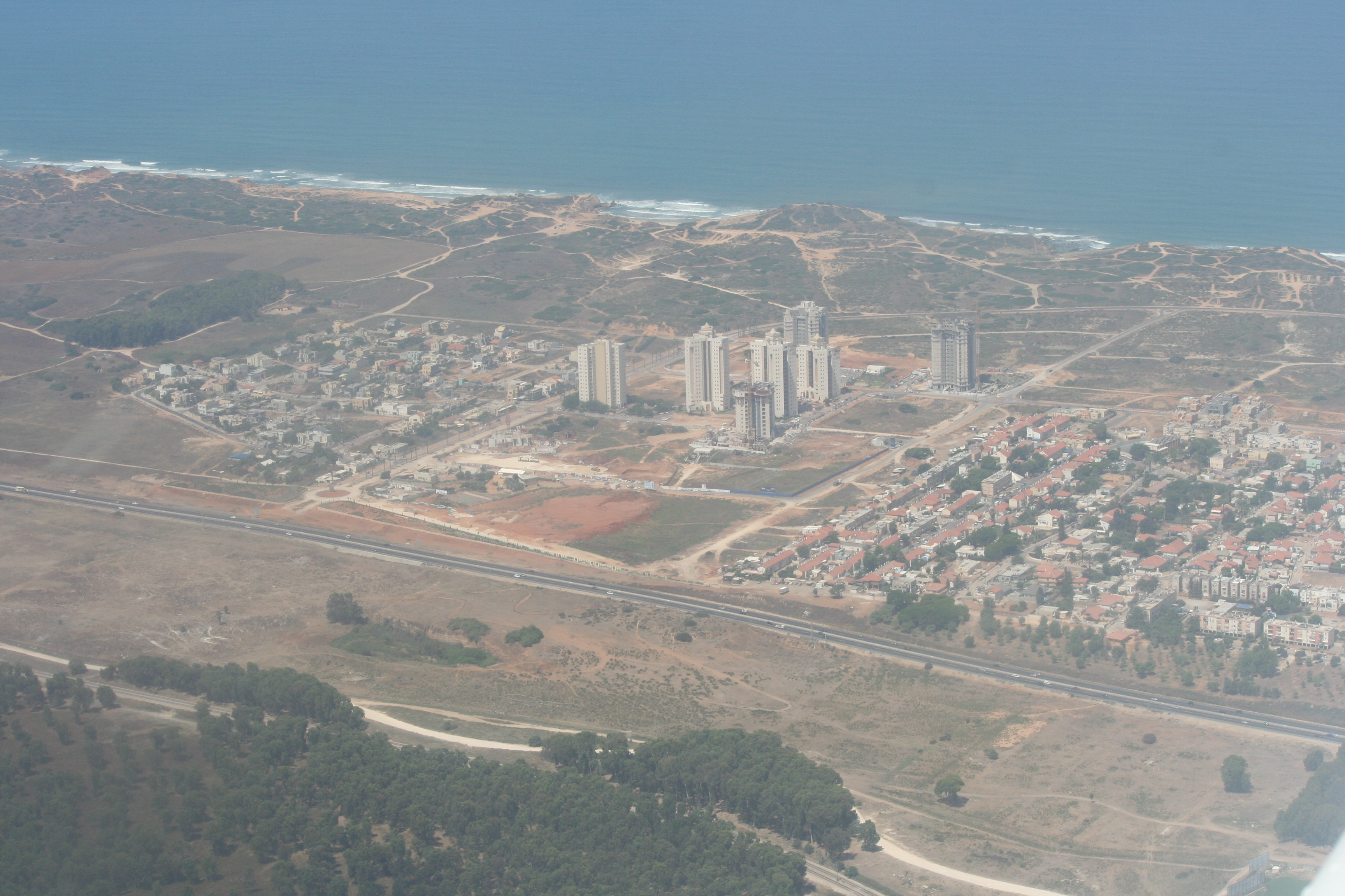 שכונת גבעת אולגה (חופים, עין הים) בחדרה ושולי יער חדרה